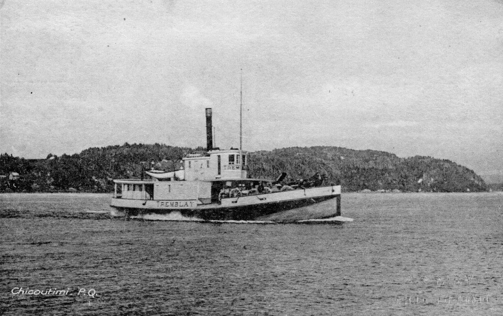 Le traversier Tremblay sur le Saguenay « Avant la construction d’un pont, soit de 1874 à 1933, un service de traversier est en opération entre Chicoutimi et la paroisse Sainte-Anne. Bénéficiant d’un quai que tardivement, il ne réussit pas à contourner toutes les difficultés reliées à ce type de transport. Fonctionnant soit à la vapeur ou par la force animale (horseboat), la traversée du Saguenay est assurée successivement par le Cyré, le Marie-Louise, le Sainte-Anne, l’Alcyon et le Tremblay. » – Éric Tremblay